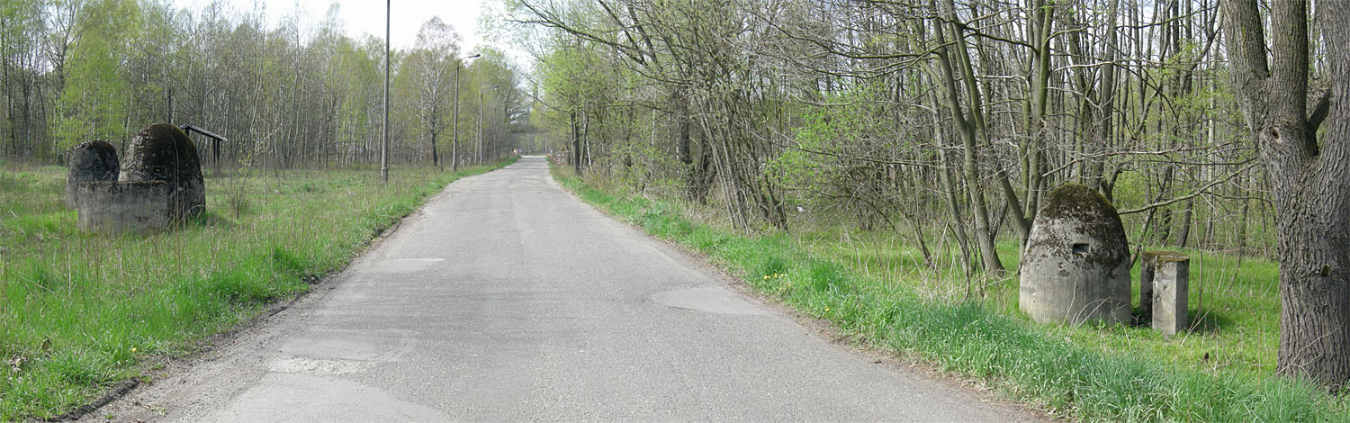 Une route menant vers le site de l'usine Blachownia Sląska.